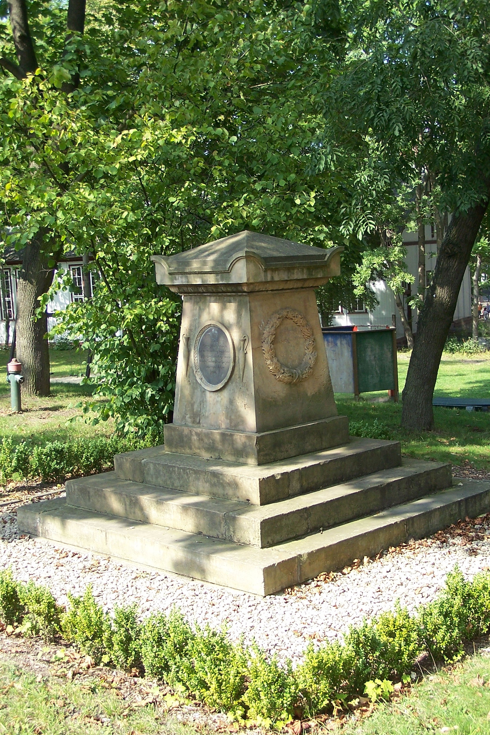 Das Löfflerdenkmal steht jetzt in Gotha, an der Puschkinallee, südlich der Ev.Luther. Kreuzkirche. Das Gelände gehört zur Löffler-Schule.